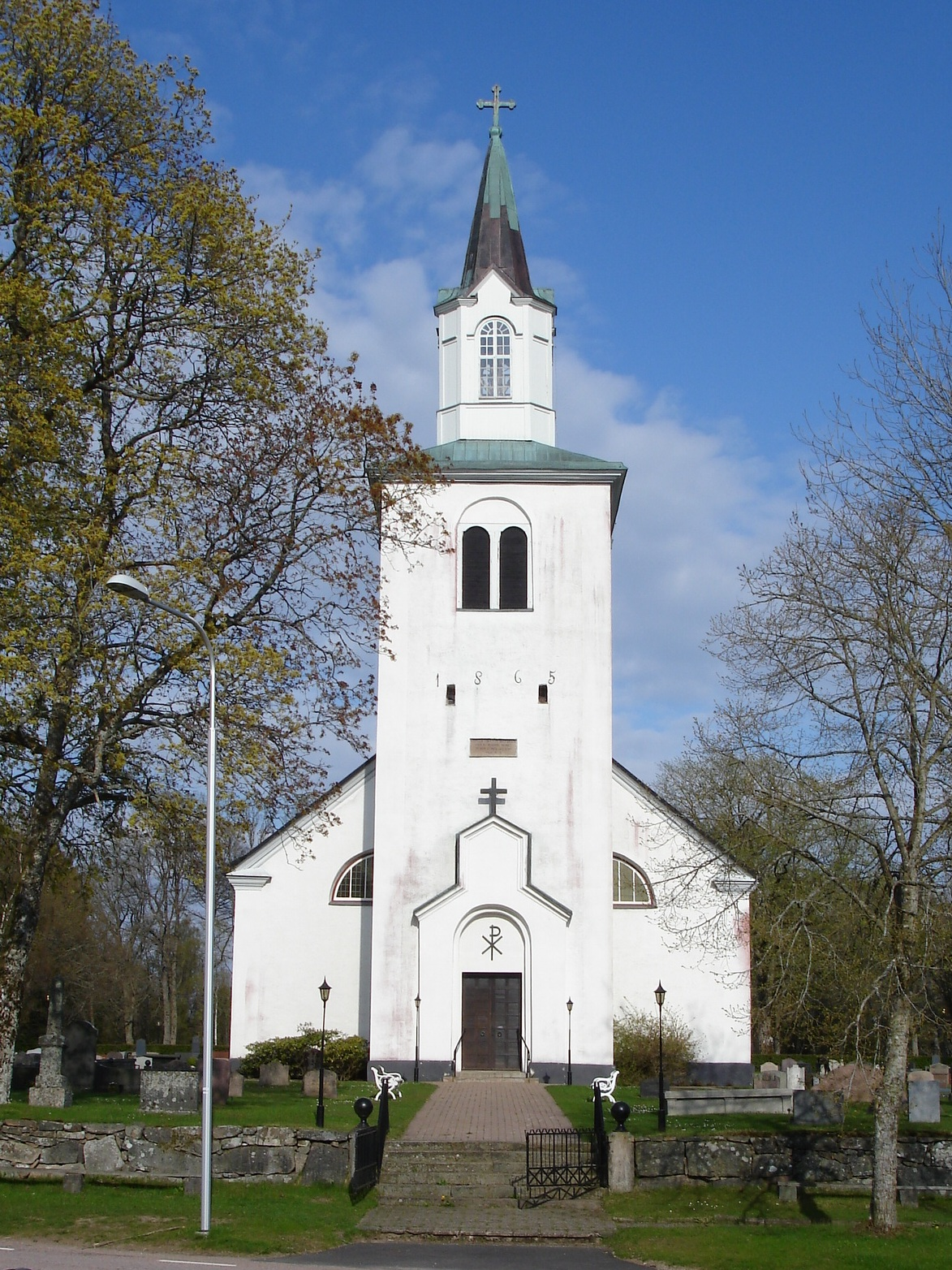 Kyrktornet åt söder